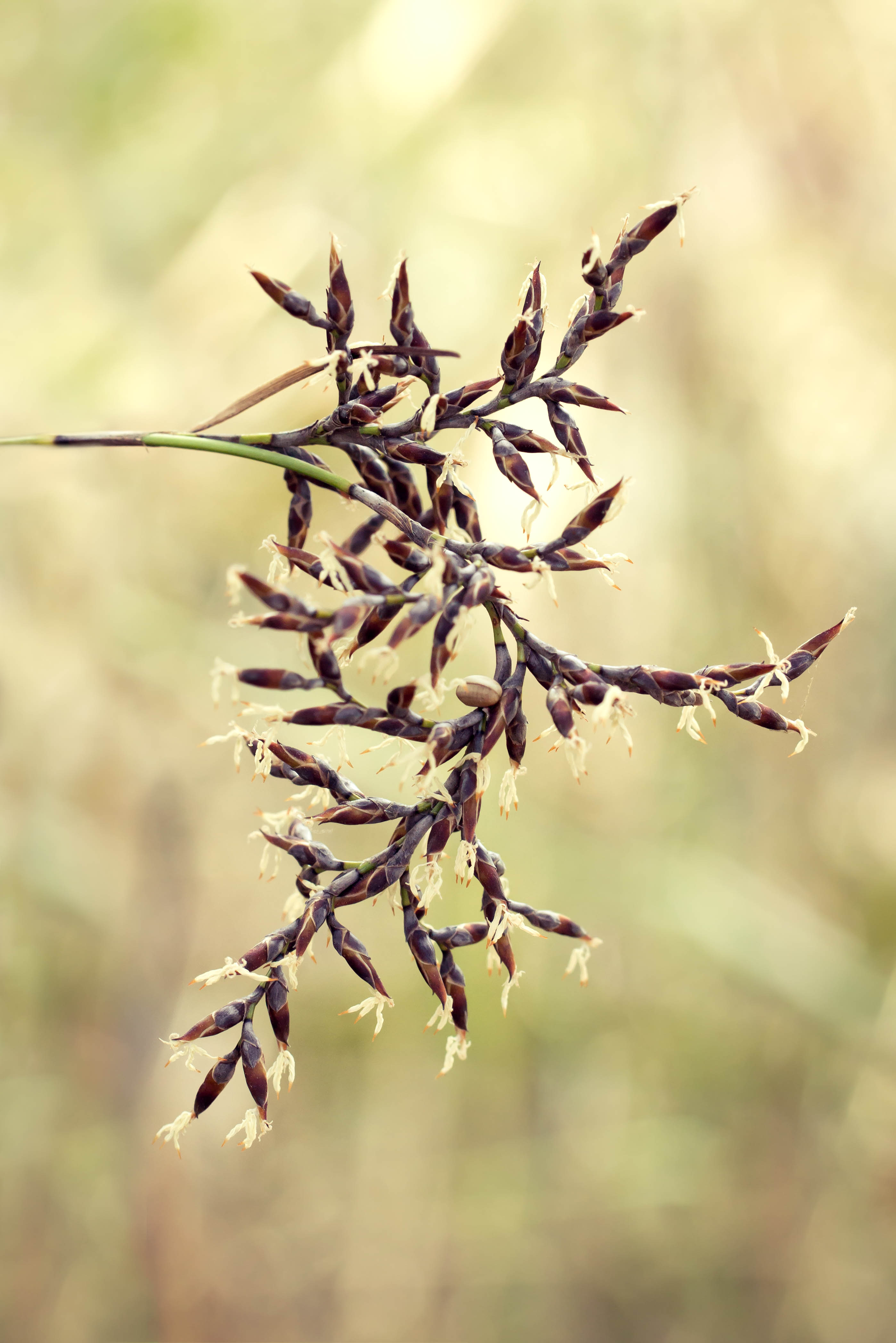 Lepidosperma squamatum